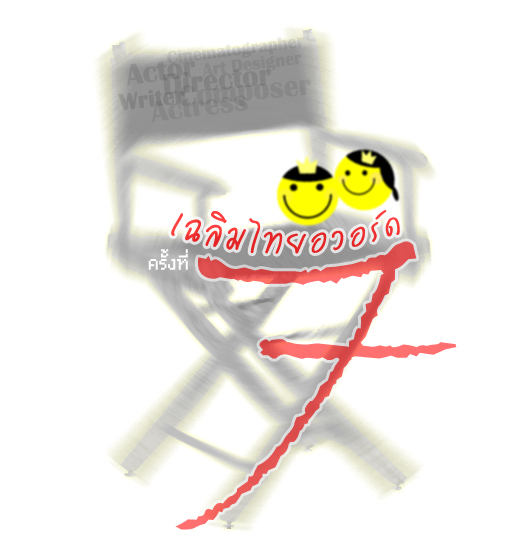 สัญลักษณ์ประจำงาน เฉลิมไทยอวอร์ด ครั้งที่ 7